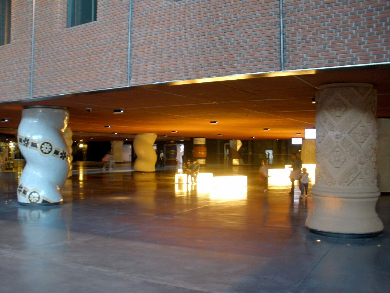 Alhóndiga de Bilbao